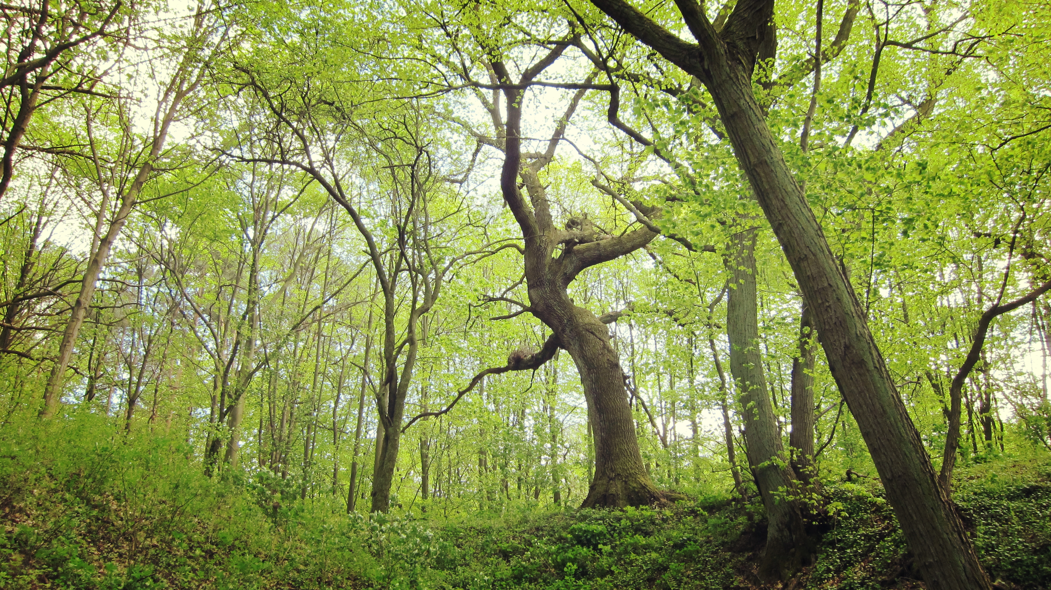 Specjalny obszar ochrony siedlisk Solecka Dolina Wisły. This is a photography of Natura 2000 protected area with ID PLH040003